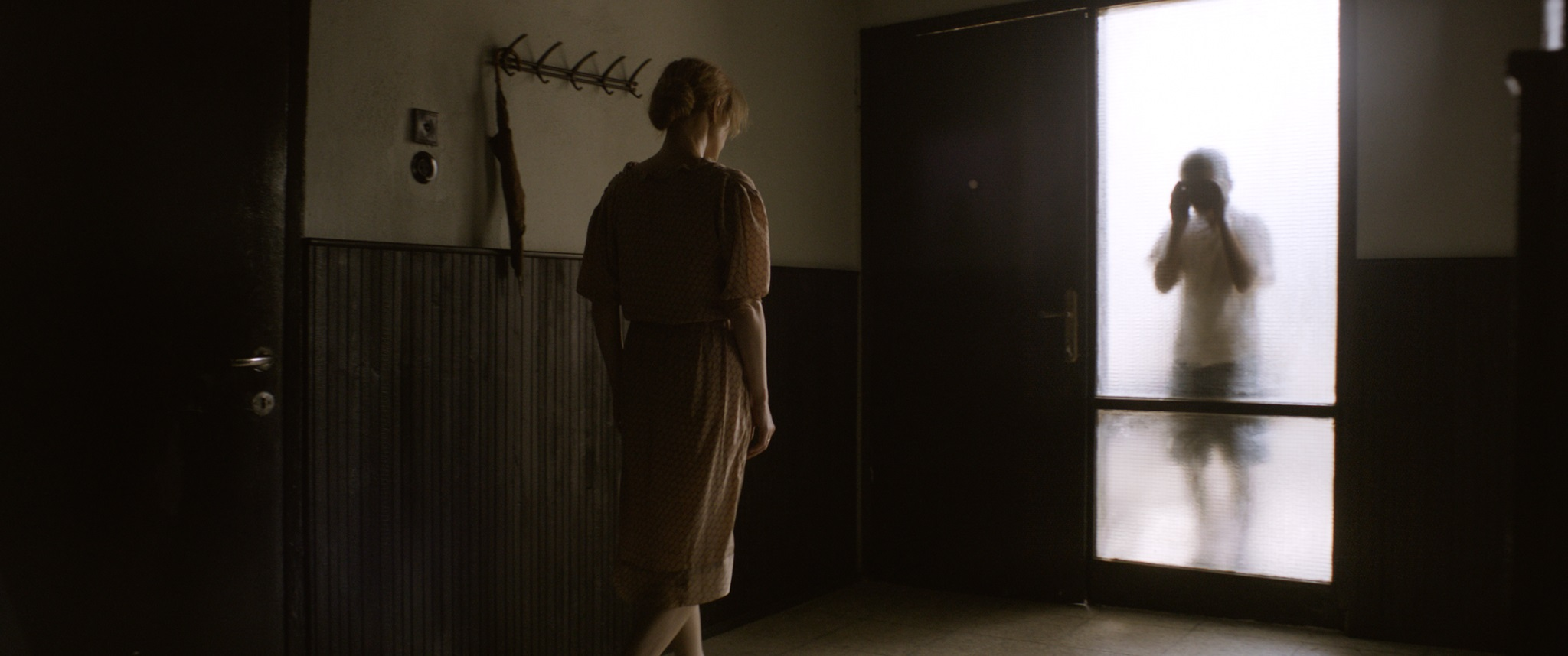 הילה וידור בסרטו של אדם סנדרסון "לוויה בצהריים", 2013